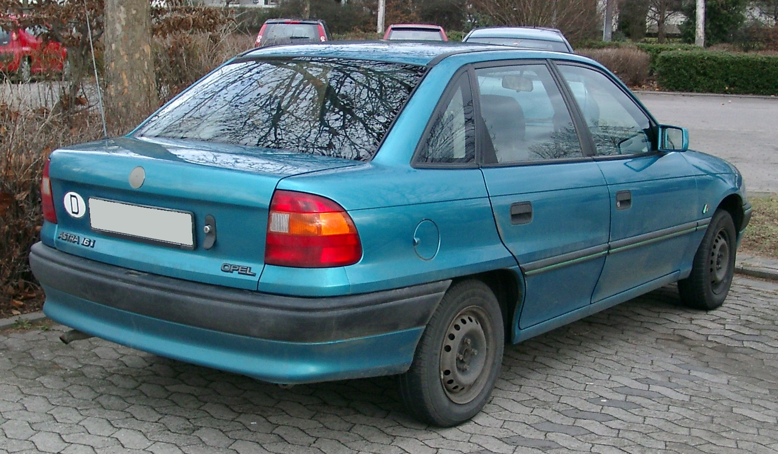 Opel Astra F Stufenheck